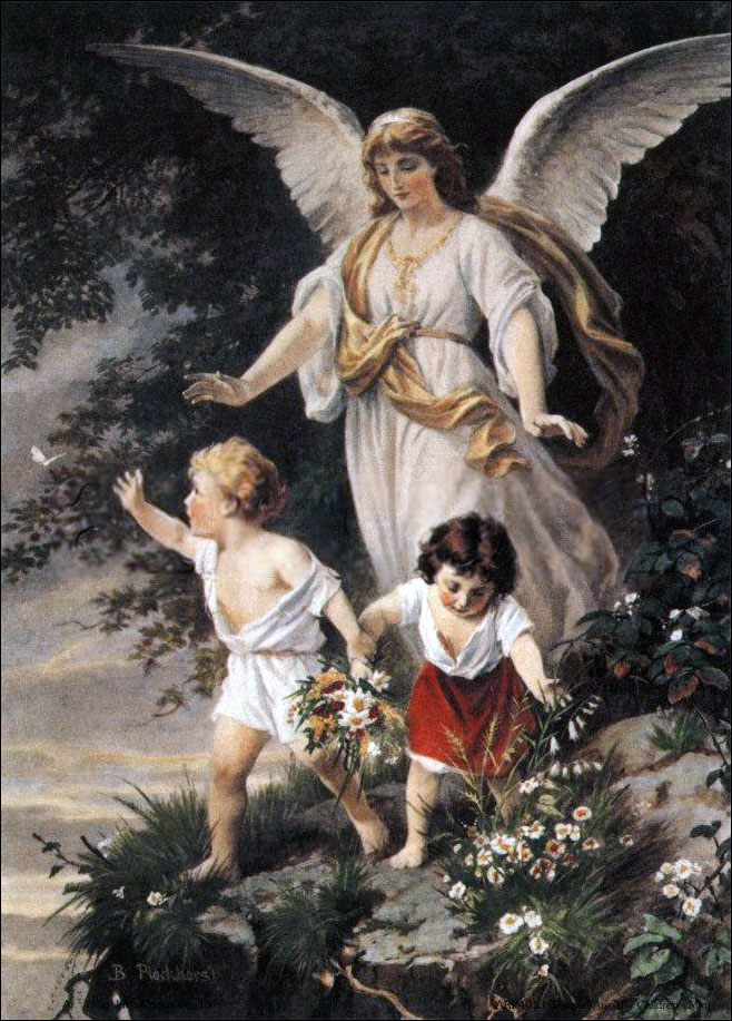 guardian Angellabel QS:Len,"guardian Angel" label QS:Lde,"Schutzengel"